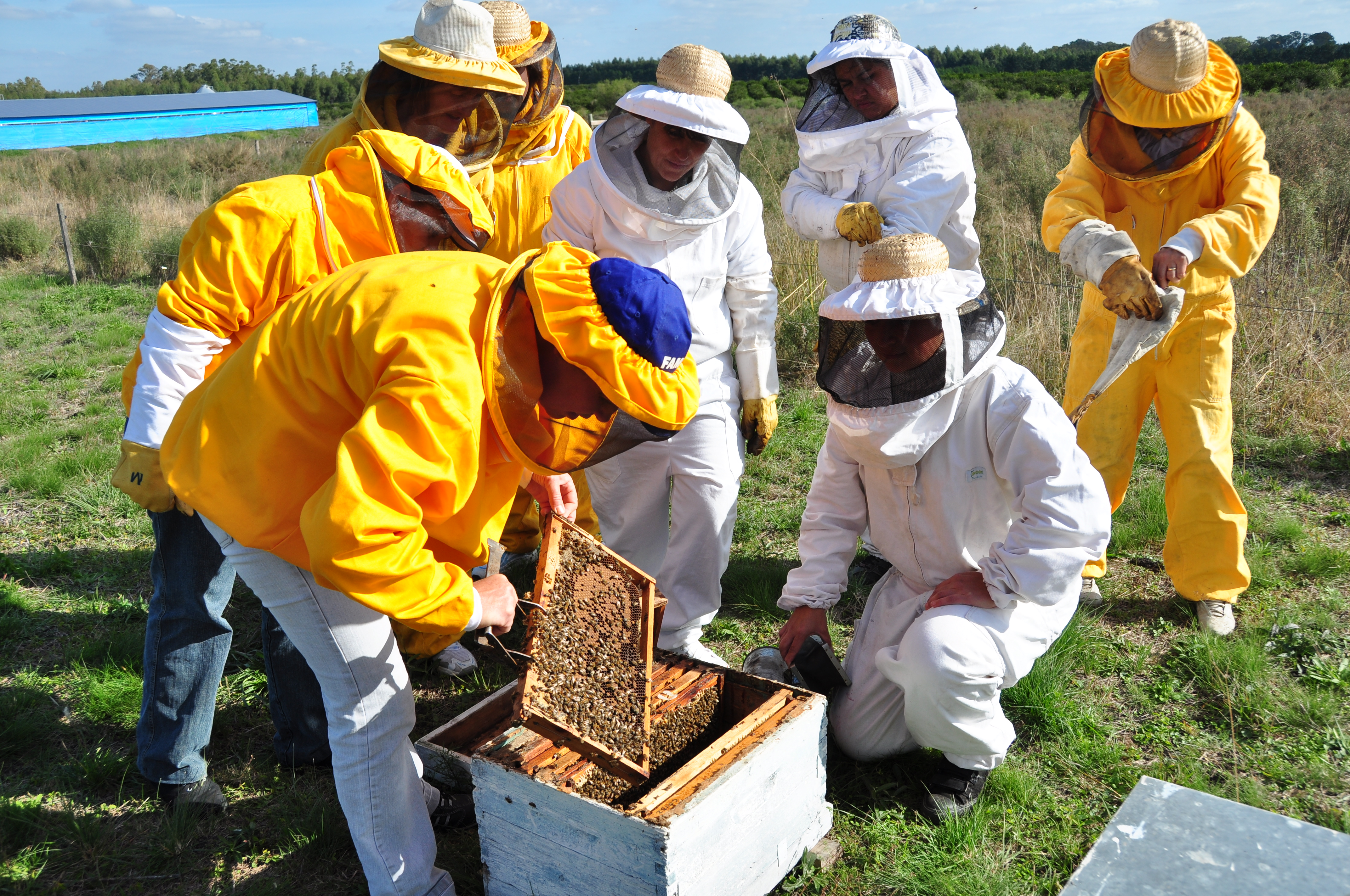 Grupo de productoras apicultoras en Los Charruas, Concordia, Entre Rios. Capacitación de INTA en cuanto al control de varroa.